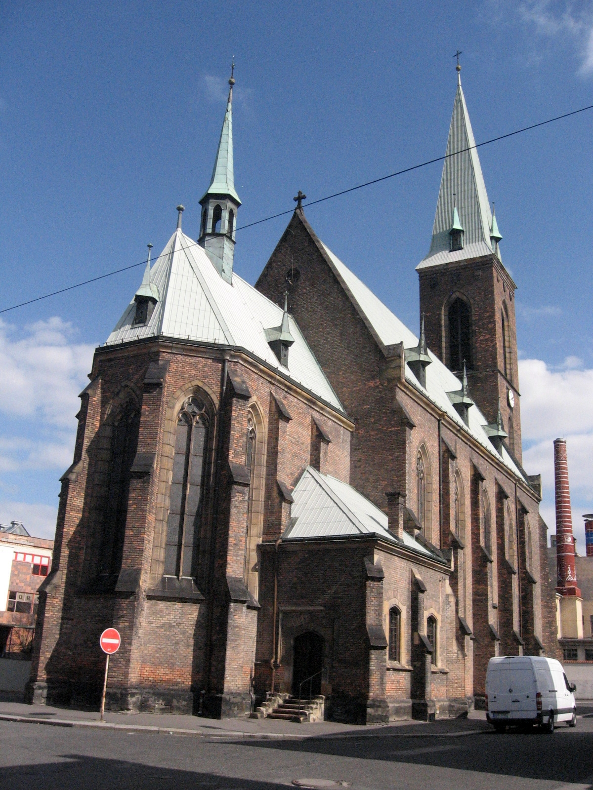 Kostel Nanebevzetí P. Marie a sv. Václava (Kralupy nad Vltavou), Palackého náměstí, Kralupy nad Vltavou